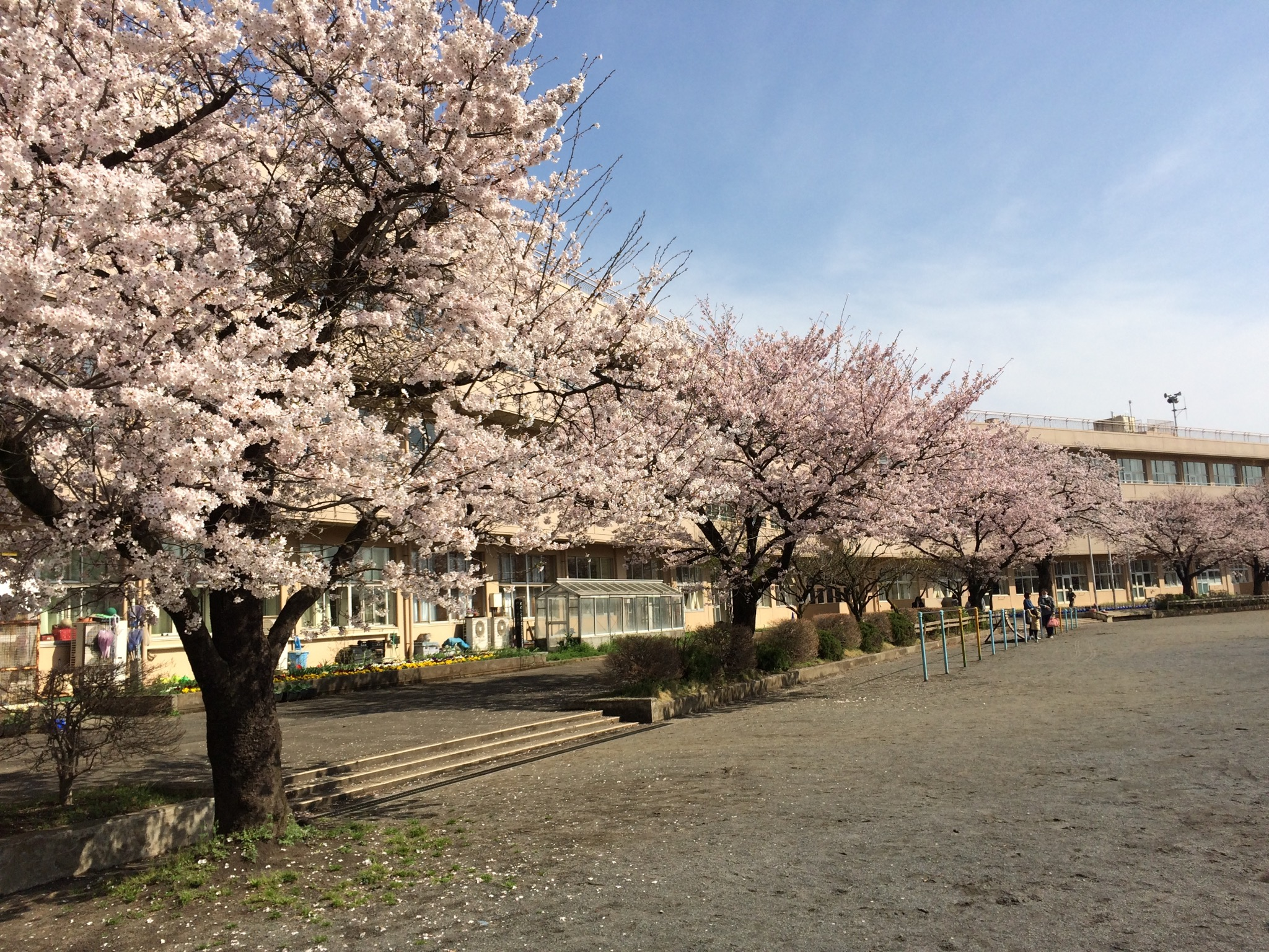 桜満開の中の今井小学校校舎